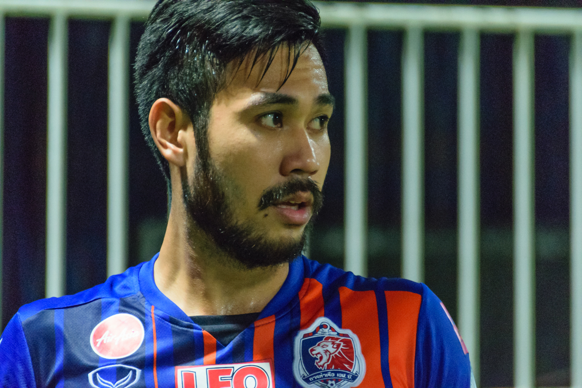 Pakorn Prempak